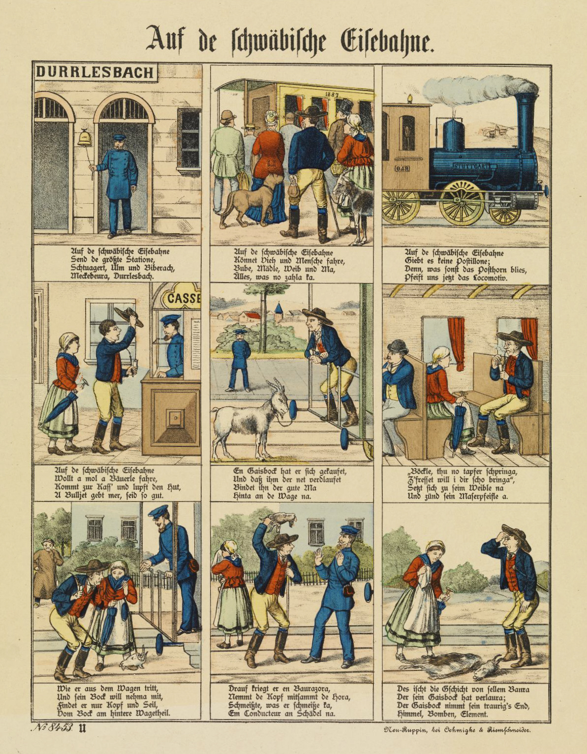 Neuruppiner Bilderbogen: Auf de schwäbische Eisenbahne (Nr. 8453 U) Oehmigke & Riemschneider, Neuruppin 1887 Germanisches Natoinalmuseum, Inventarnummer: HB27317